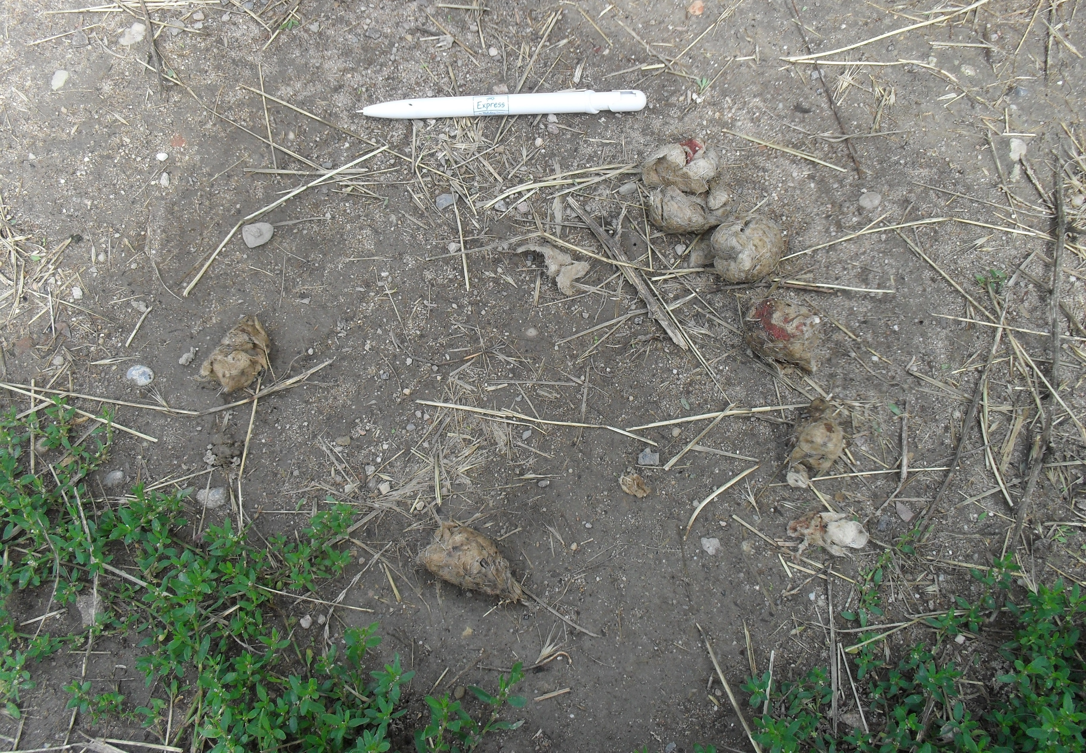 Wolfslosung